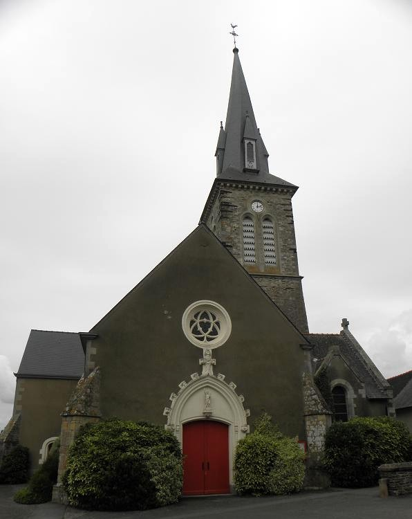 Façade principale de l'église Saint-Jean-Baptiste de Saint-Jean-sur-Vilaine (35).